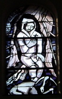 Kirchenfenster des Heiligen Gerold von Großwalsertal